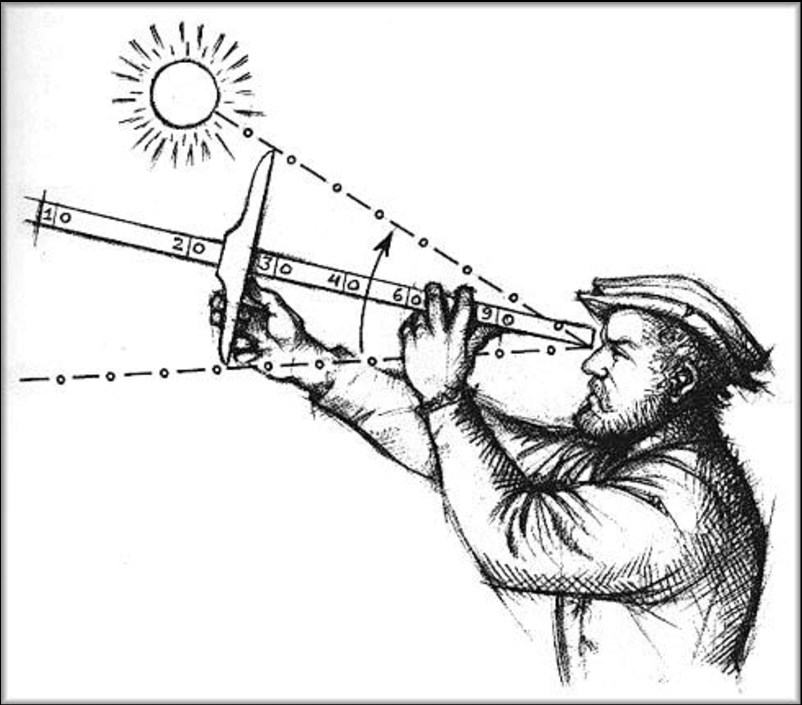 Cross Staff